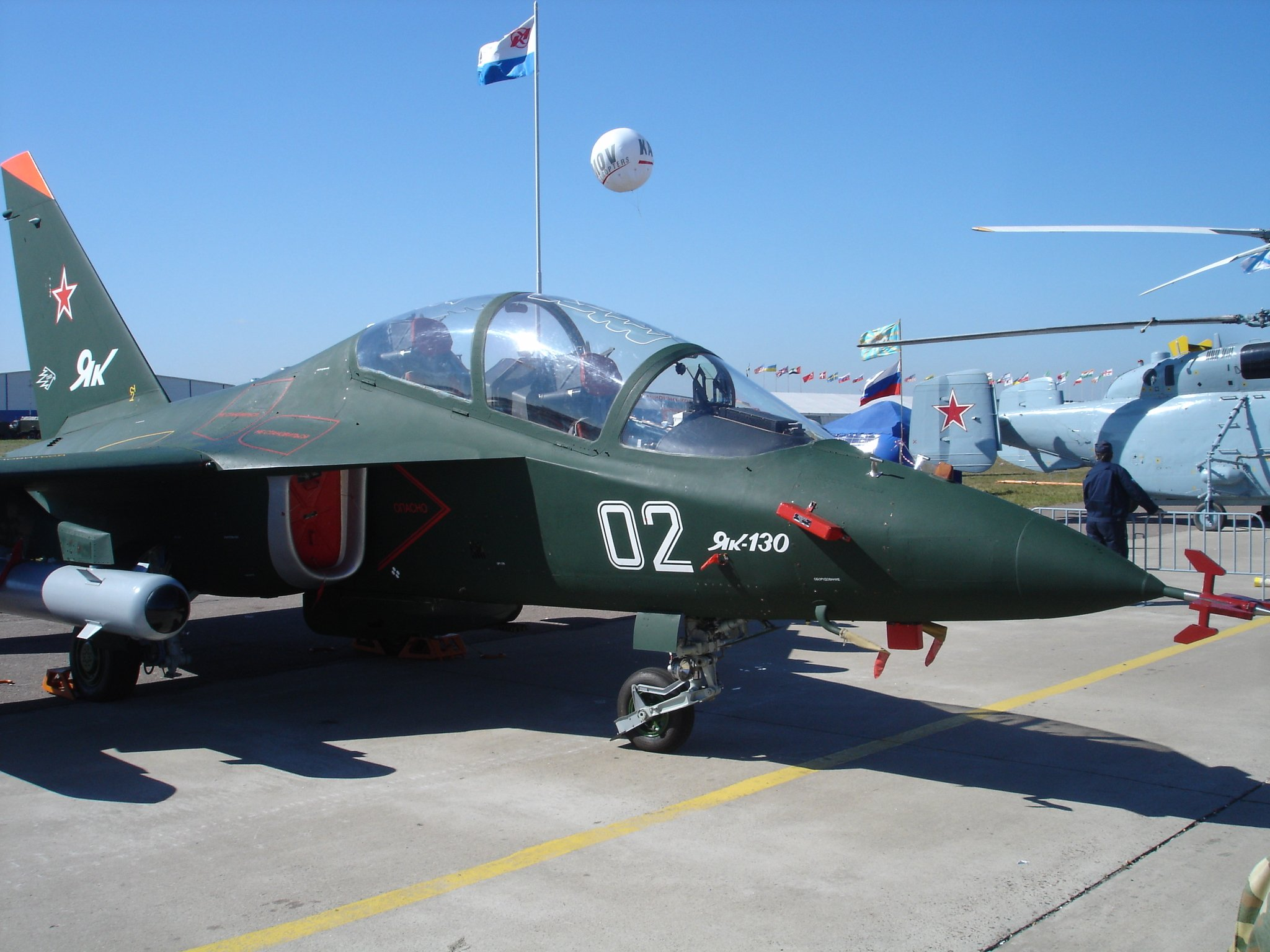 Yak-130 at MAKS, Zhukovskiy, 2005.